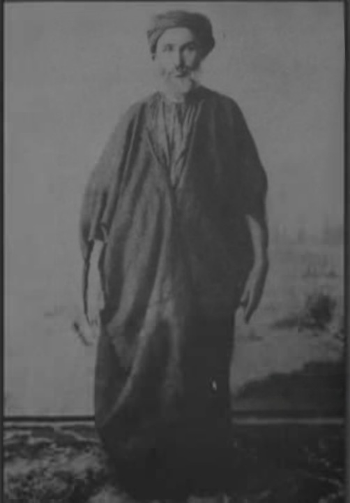 الشيخ راكان بن حثلين زعيم قبيلة العجمان